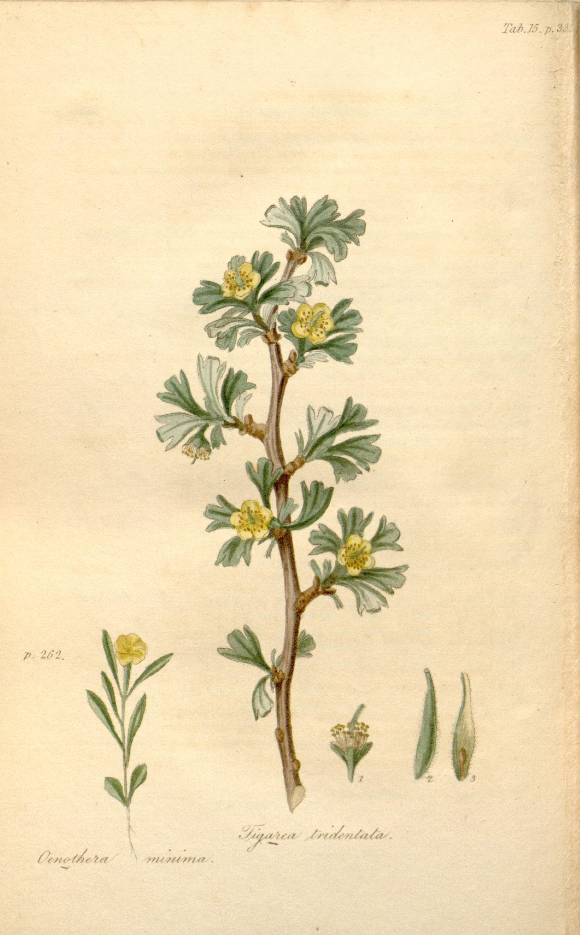 Taf..15.ji.6. p. 2/J'2. PrH. //?. \ yrf ^ nf^ /// ?fifr